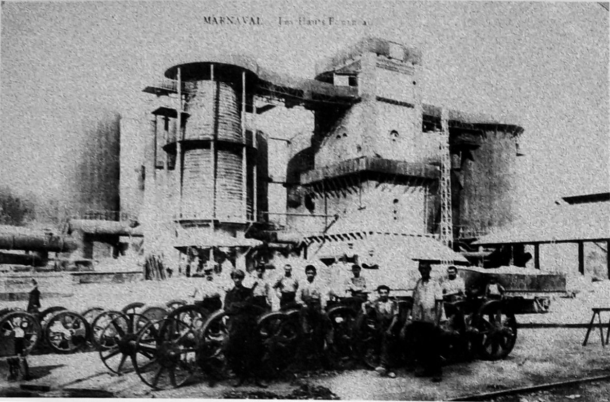 vue des hauts fourneaux.